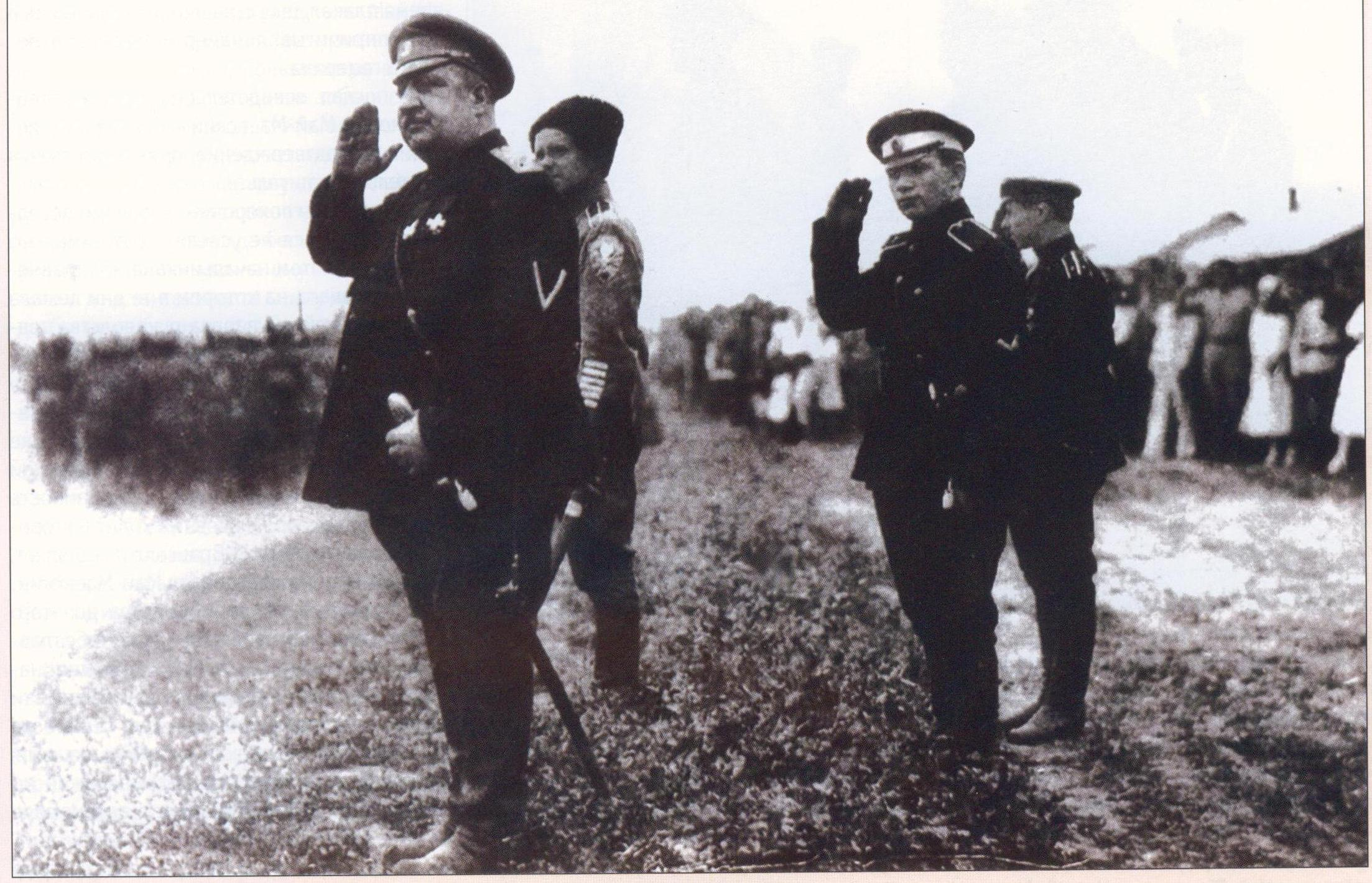 Смотр 2-го Корниловского ударного полка, Ростов. Командующий белой Добровольческой армией генерал Владимир Зенонович Май-Маевский (на переднем плане в дроздовской форме), командир 2-го Корниловского ударного полка капитан Я.А. Пашкевич (частично закрыт, в корниловской форме с шевроном "мёртвая голова" и шапке-"кубанке") и адъютант Его Превосходительства красный разведчик капитан Павел Васильевич Макаров (в дроздовской, как и командующий, форме, третий слева). Ростов-на-Дону, июль 1919 года. См. также Обсуждение:Макаров, Павел Васильевич#Изображения Павла. Какой из двоих Макаров-то?